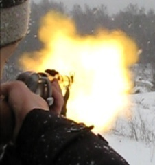 Выстрел из Карабина Охотничьего 1944 года выпуска (КО-44). Датировка кадра приблизительна.